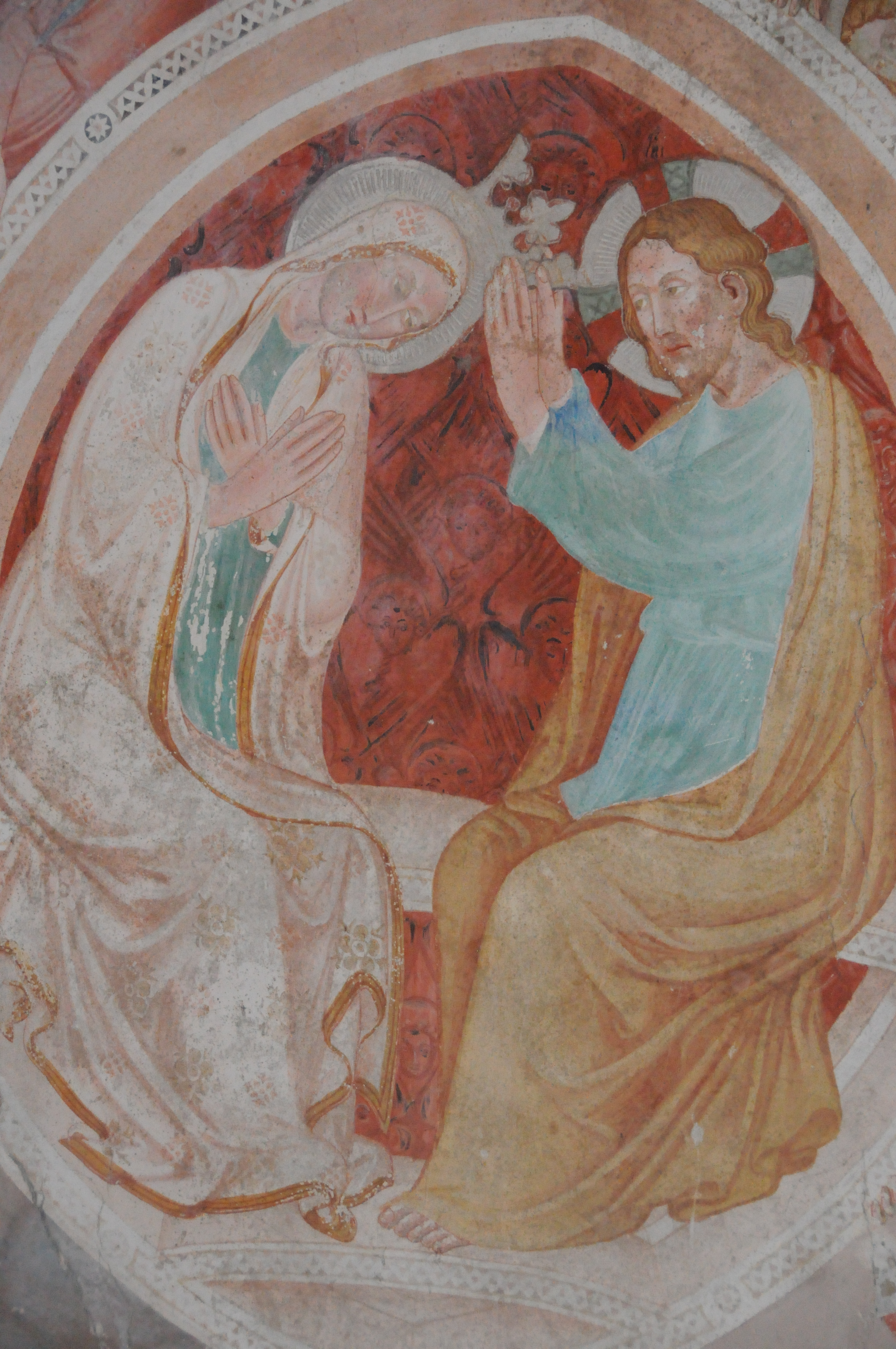 Abbazia di San Giuliano